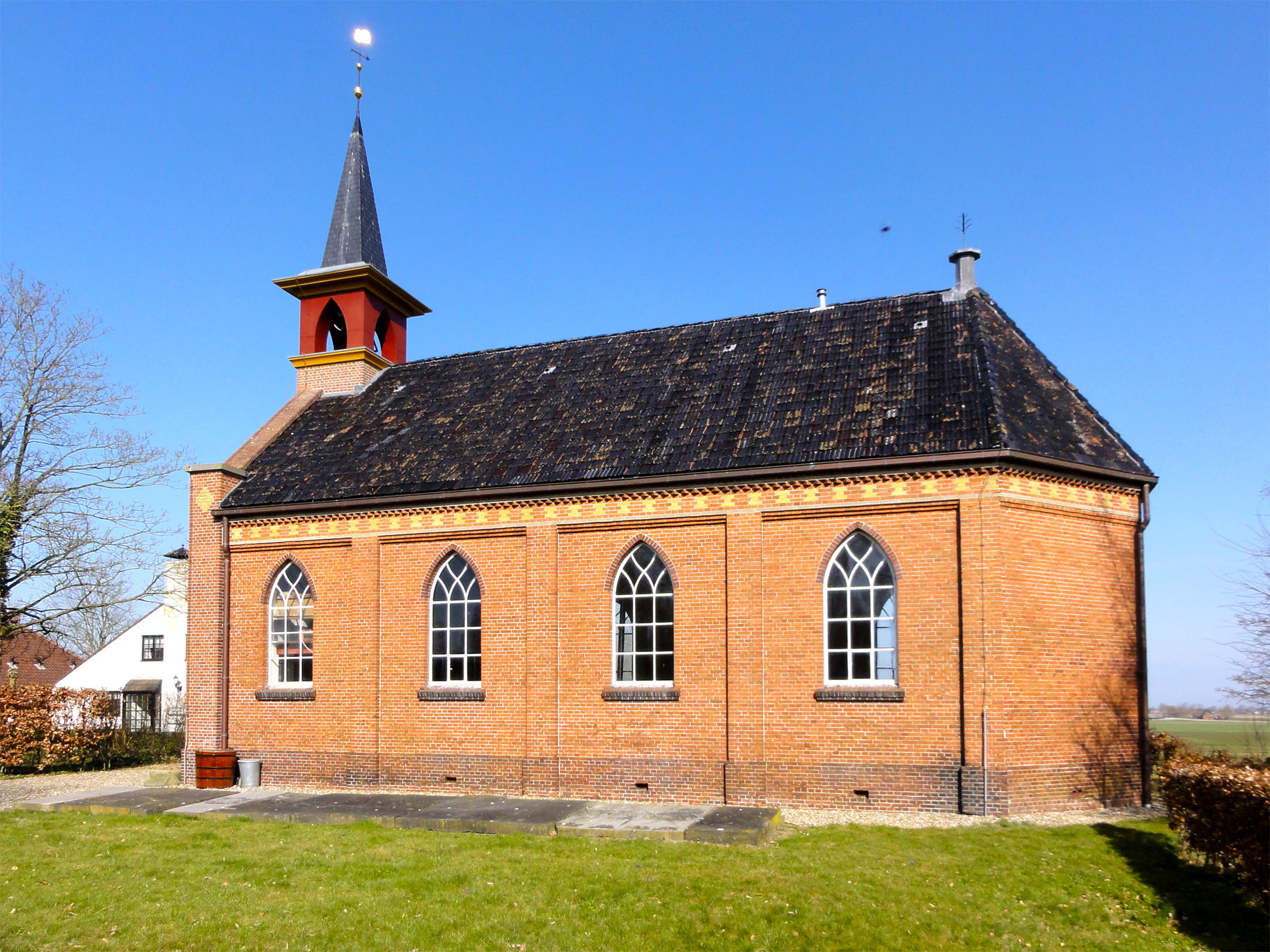 Hervormde kerk van Rottum